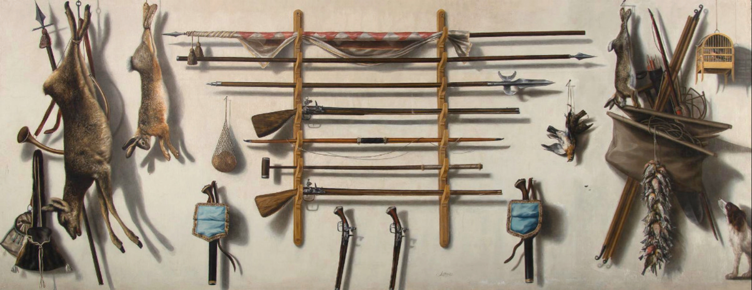 Trampantojo con armería y parafernalia de caza, óleo sobre lienzo, 180,3 x 461,6 cm , 's-Hertogenbosch, NoordBrabants Museum